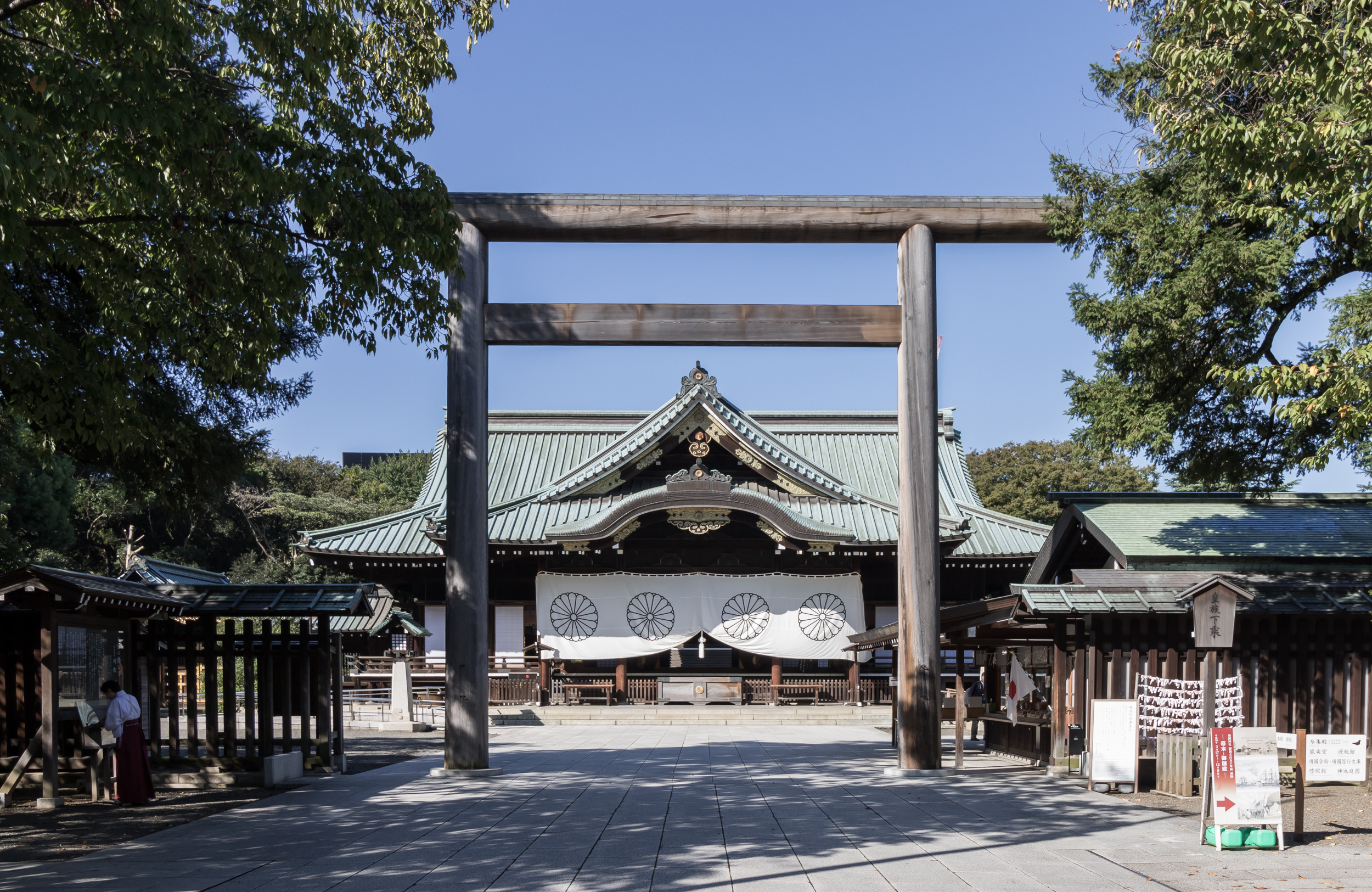 靖国神社。中門鳥居。